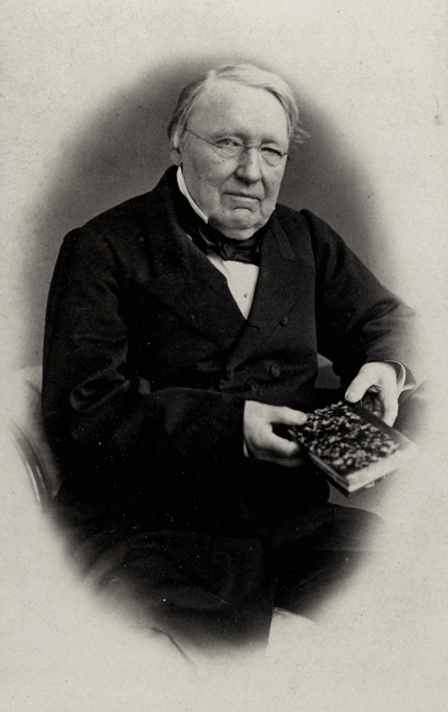 Otto Joel Gumaelius, rektor vid Karolinska läroverket.